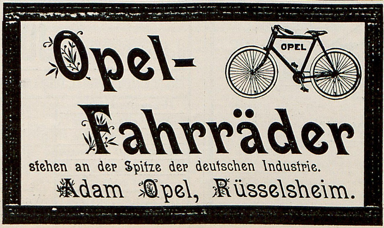 Werbung für Opel Fahrräder. In: "Jugend", Ausgabe Nr. 14, 1897